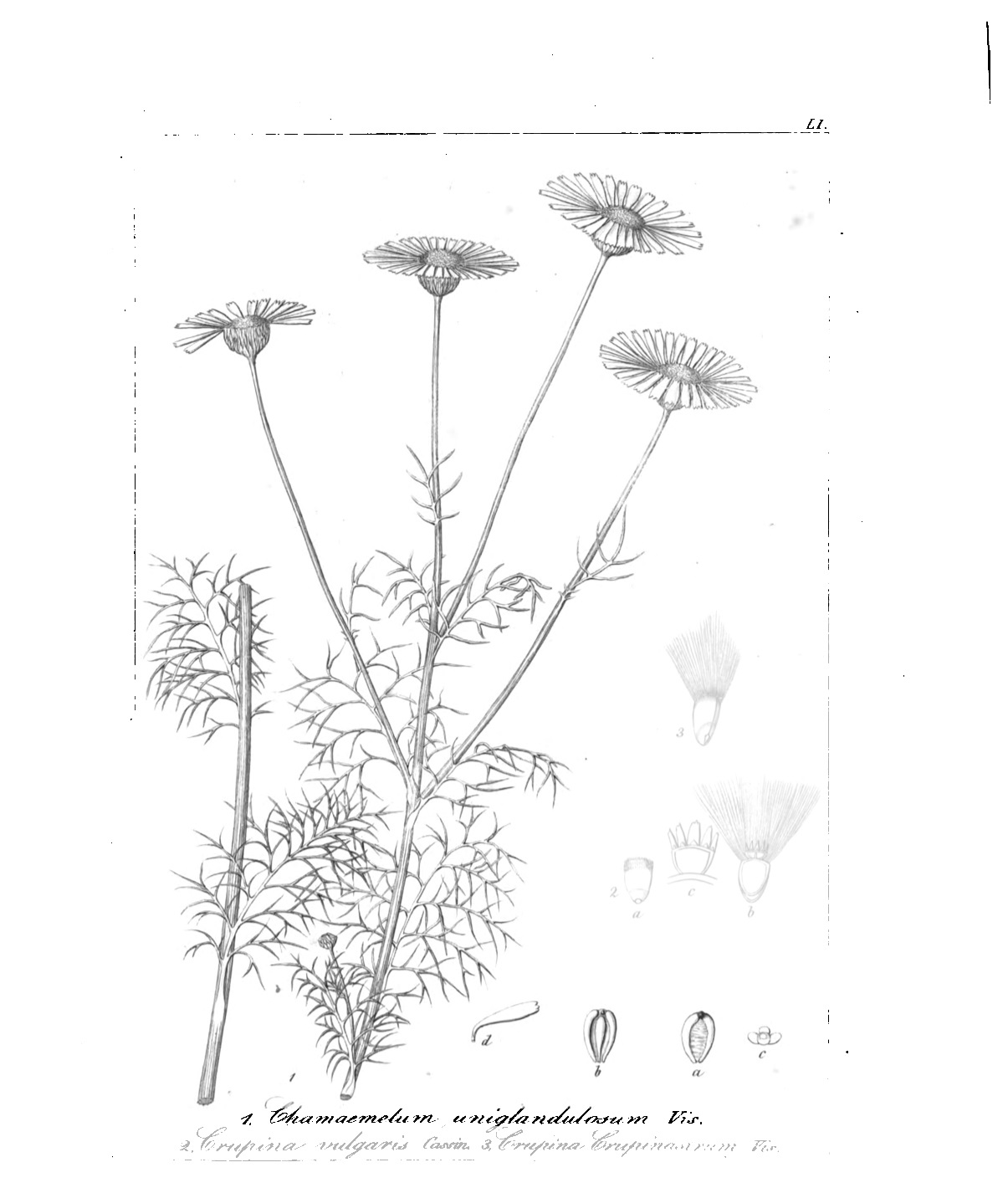 Legende: 1 Oberer Teil der Pflanze. a Frucht, Hinteransicht. b Frucht, Vorderansicht. c Frucht, pappuslose Spitze. d Stahlenblüte